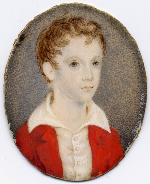 Николай Александрович Тучков (1811-1826), сын А.А.Тучкова и М.М.Нарышкиной.